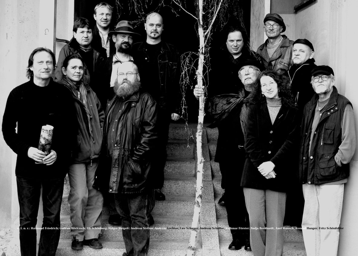 Laterne-Mitglieder.jpg/mini/Mitglieder des Kunstvereins,2003 Fotografie:Jürgen Gerhardt